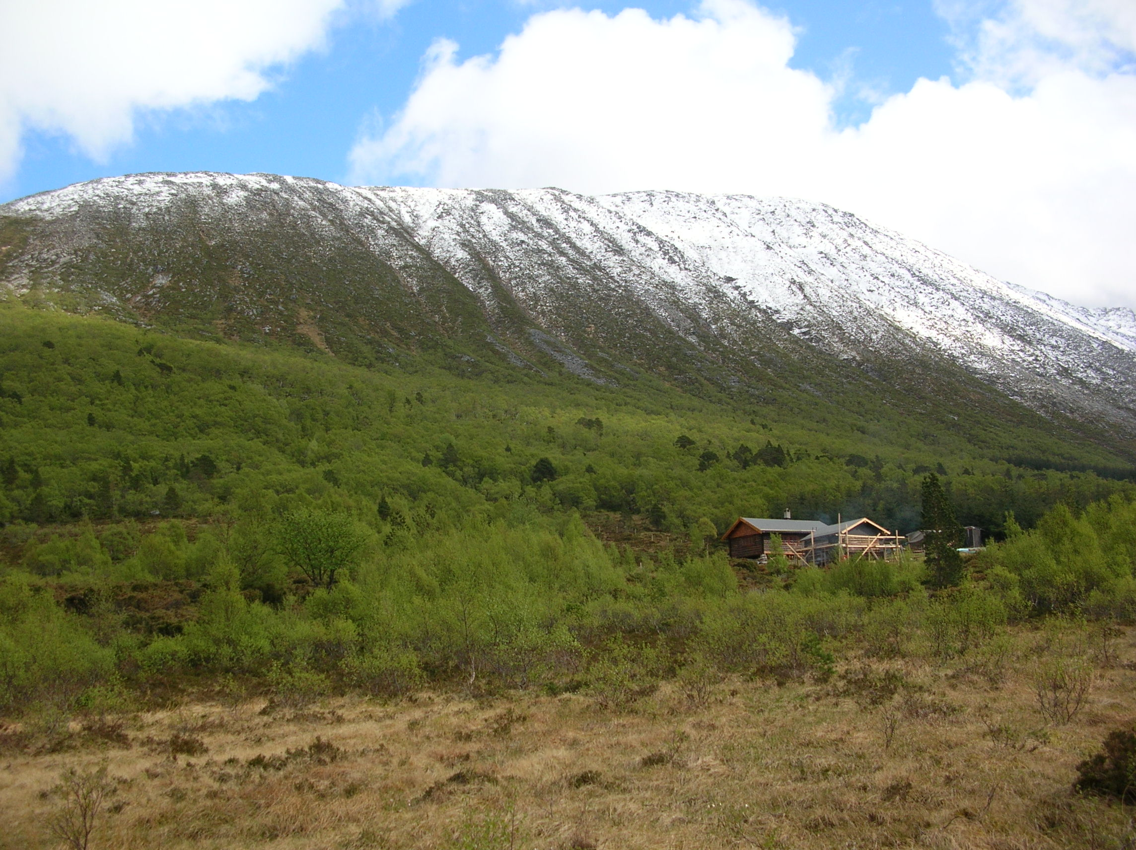 Turisthytten Gullsteinvollen i Aure kommune, Møre og Romsdal. Fjellet Skarven i bakgrunnen.